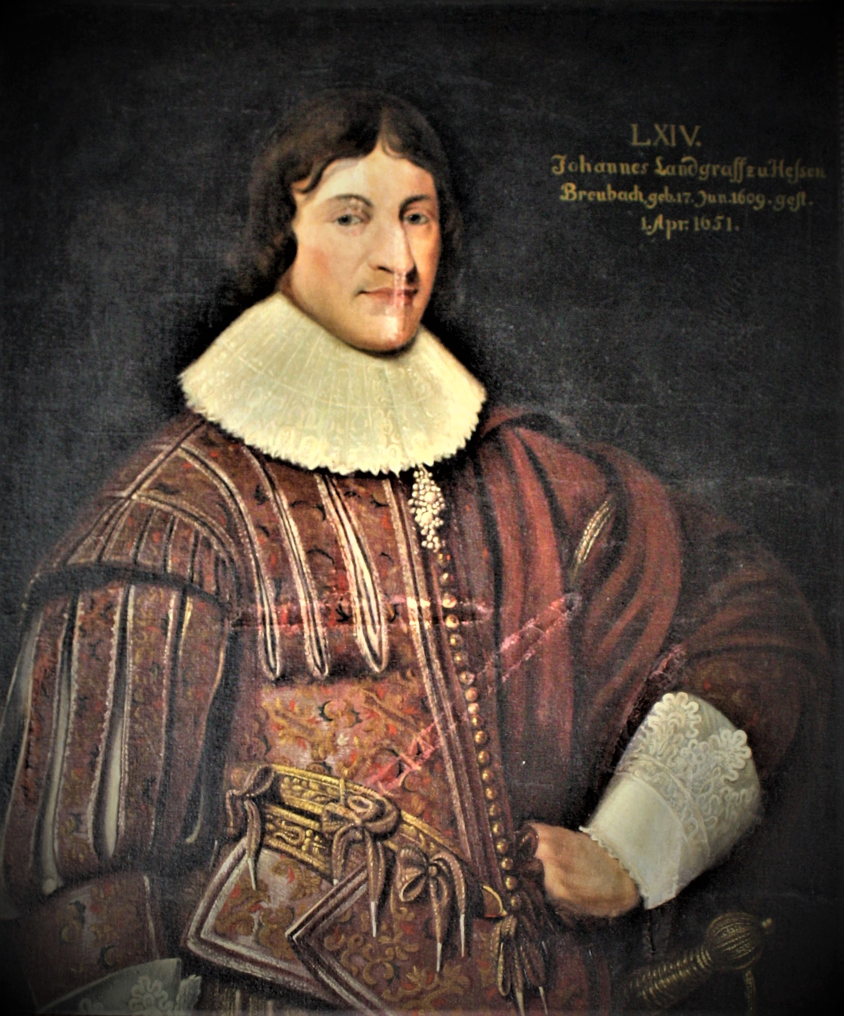 Johannes Landgraf v. Hessen-Braubach (* 17.6.1609 Darmstadt, † 1.4.1651 Bad Ems) Gemälde eines unbekannten Malers auf der Marksburg in Braubach